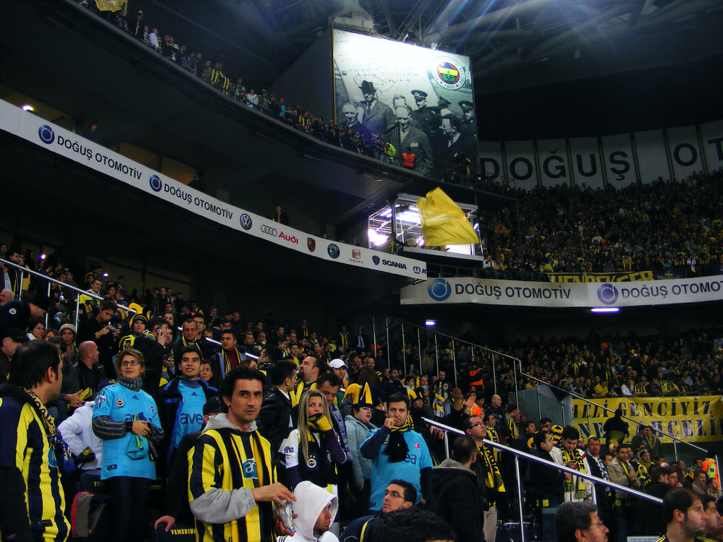 FB Stad Manzara